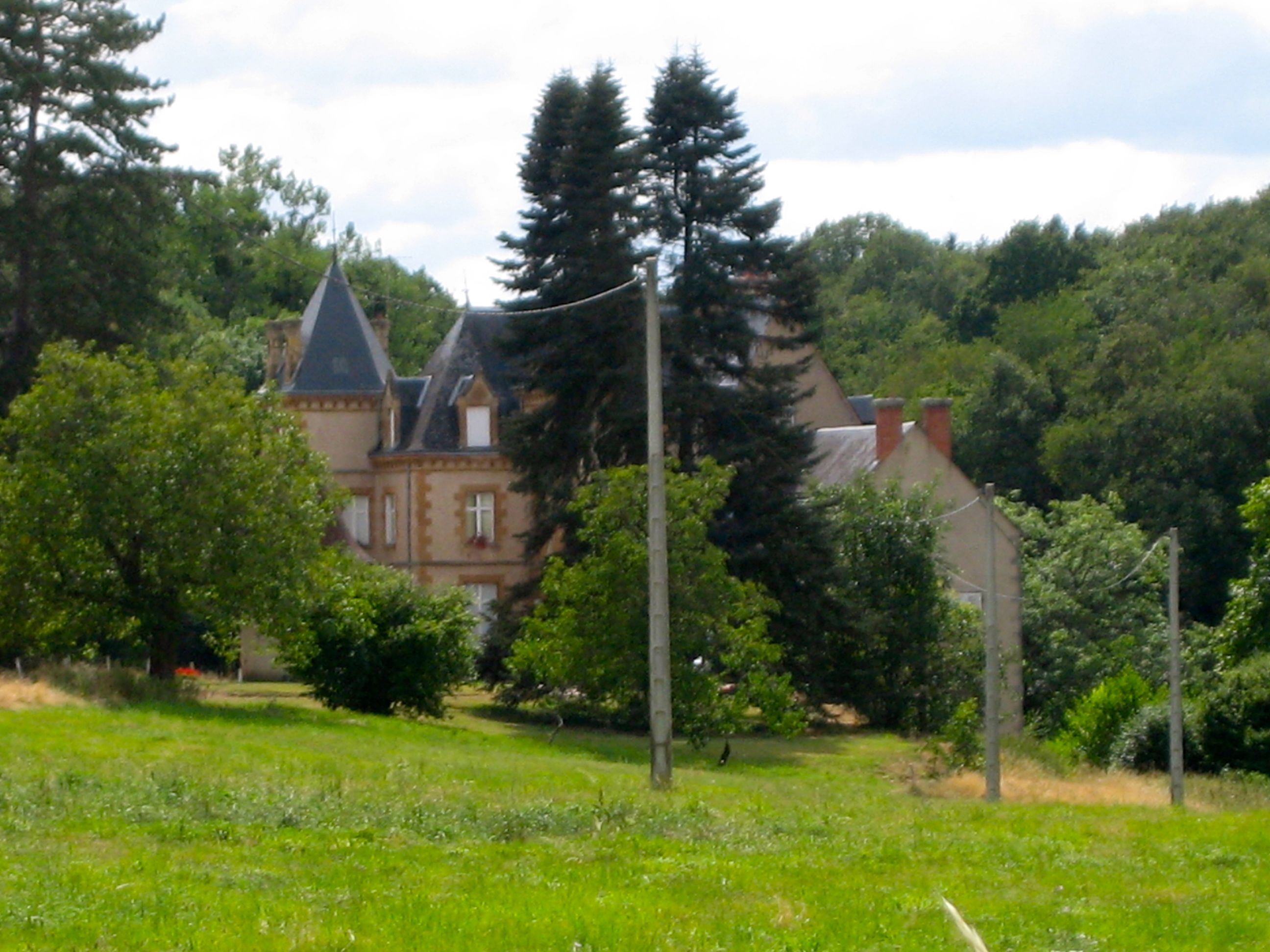 Néret Château Lavallas